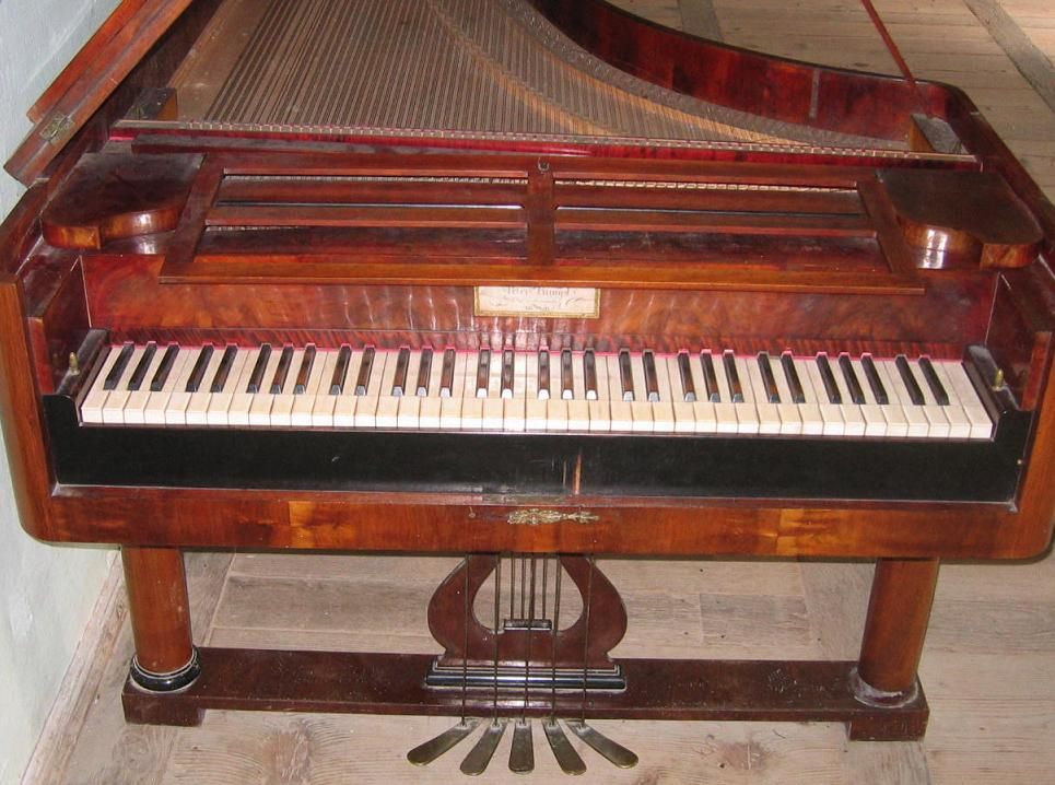 Klavir s kladivci na gradu Tuštanj; izdelal ga je Peter Rumpl na Dunaju leta 1805.